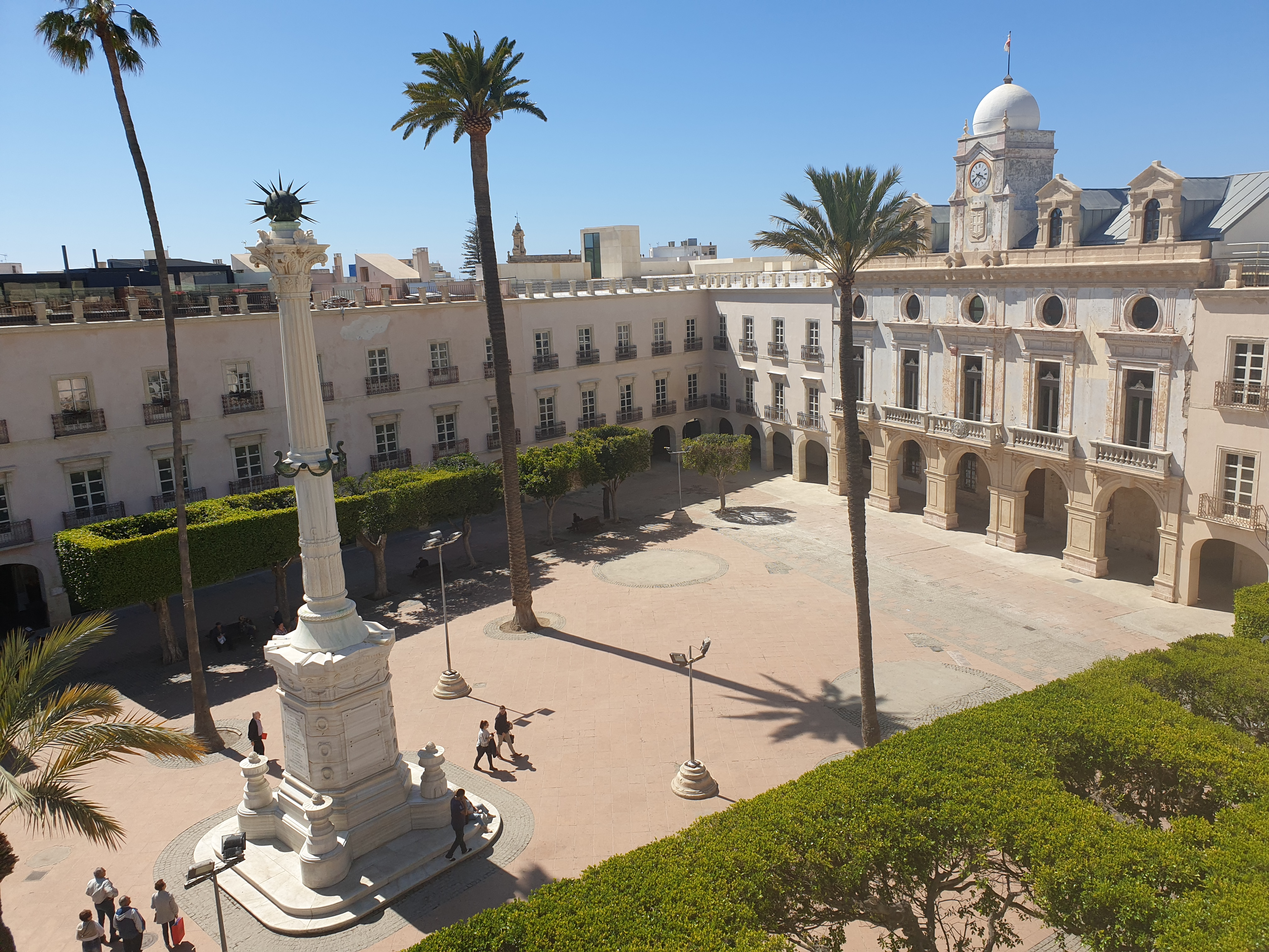 Plaza de la Constitución de Almería en abril de 2019